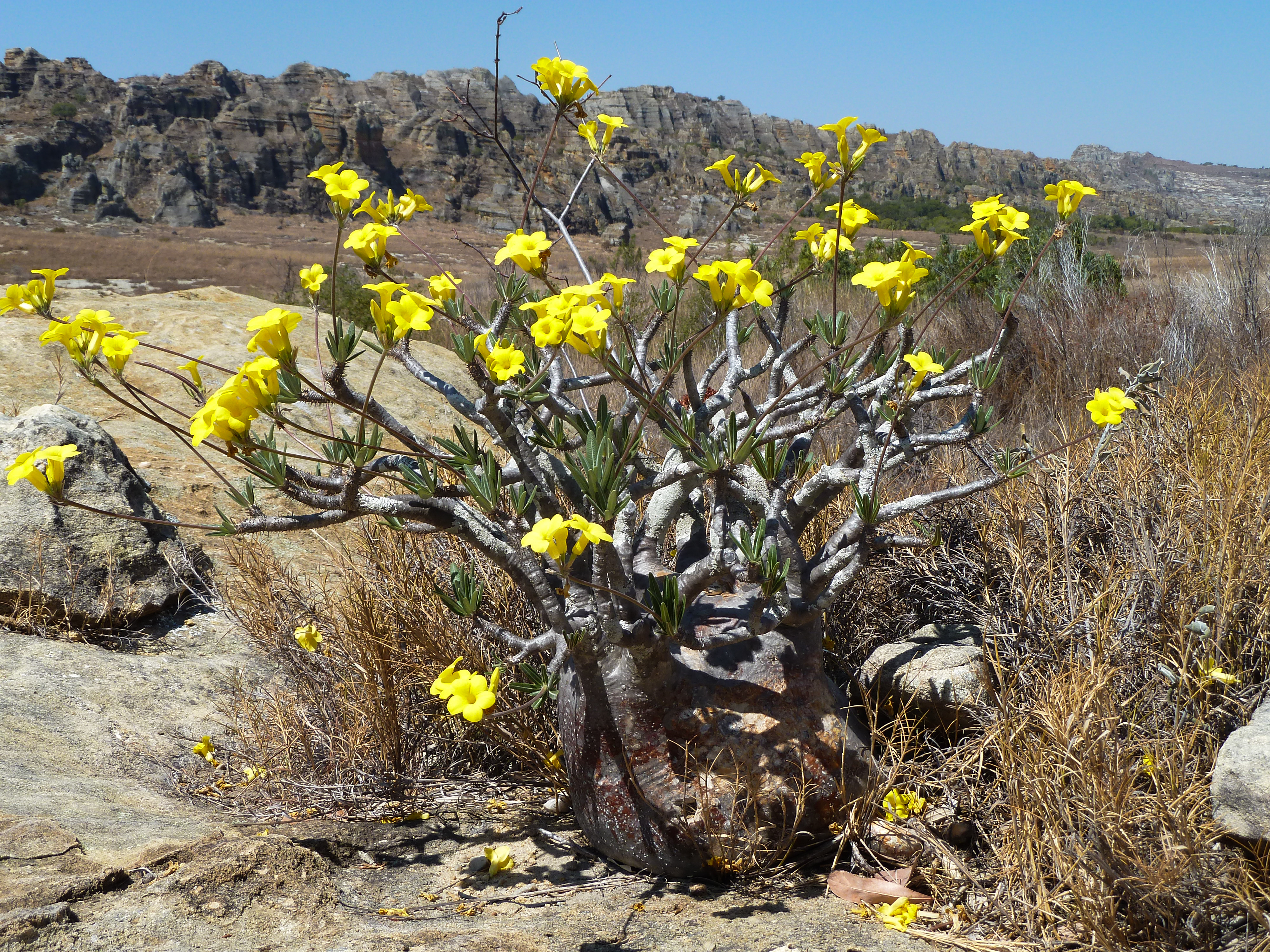 Pachypodium rosulatum in bloei in NP Isalo